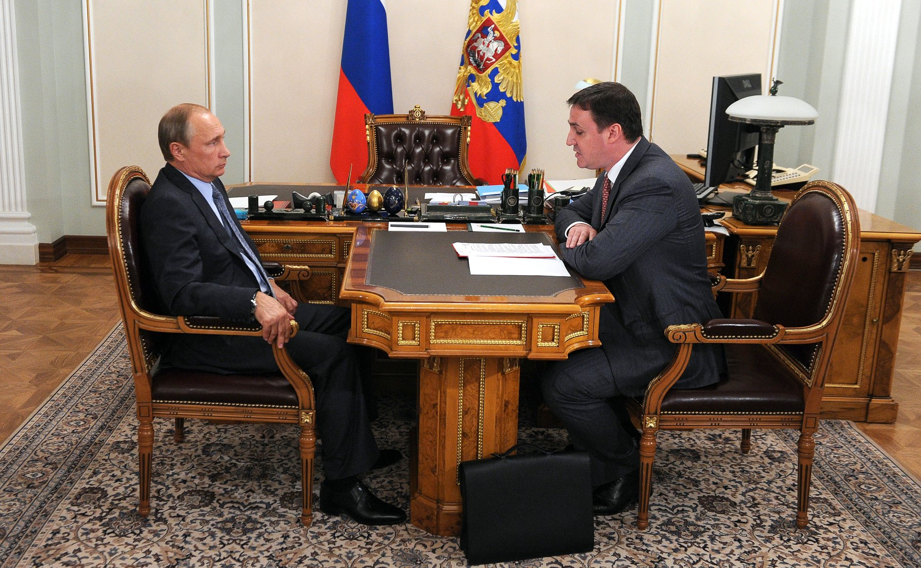 Встреча Владимира Путина с председателем правления «Россельхозбанка» Дмитрием Патрушевым